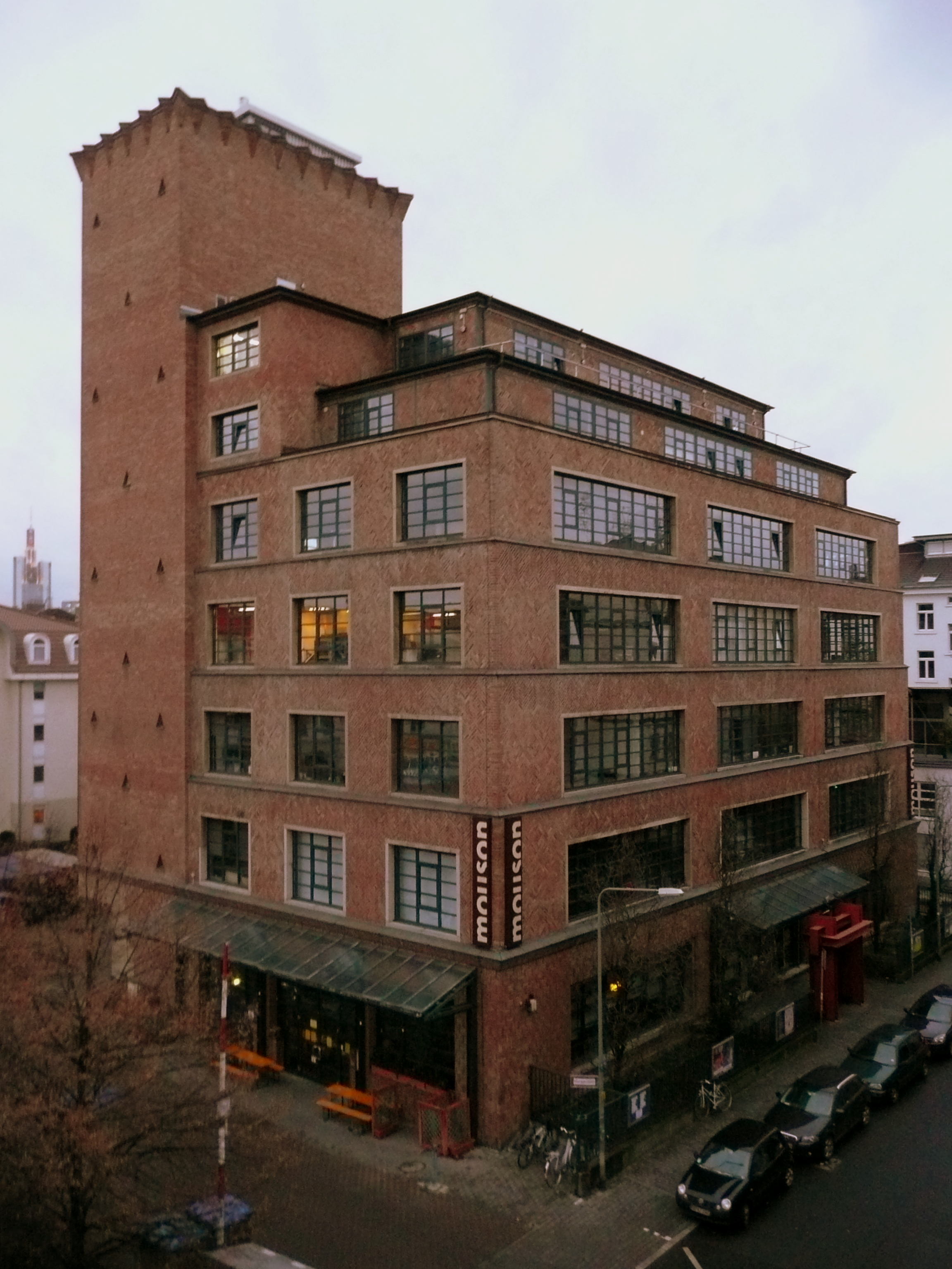 Mousonturm in Frankfurt am Main. Das Künstlerhaus Mousonturm ist ein freies Theater in Frankfurt am Main. Träger des Theaters ist die Künstlerhaus Mousonturm Frankfurt GmbH; Frankfurt, Waldschmittstraße 4